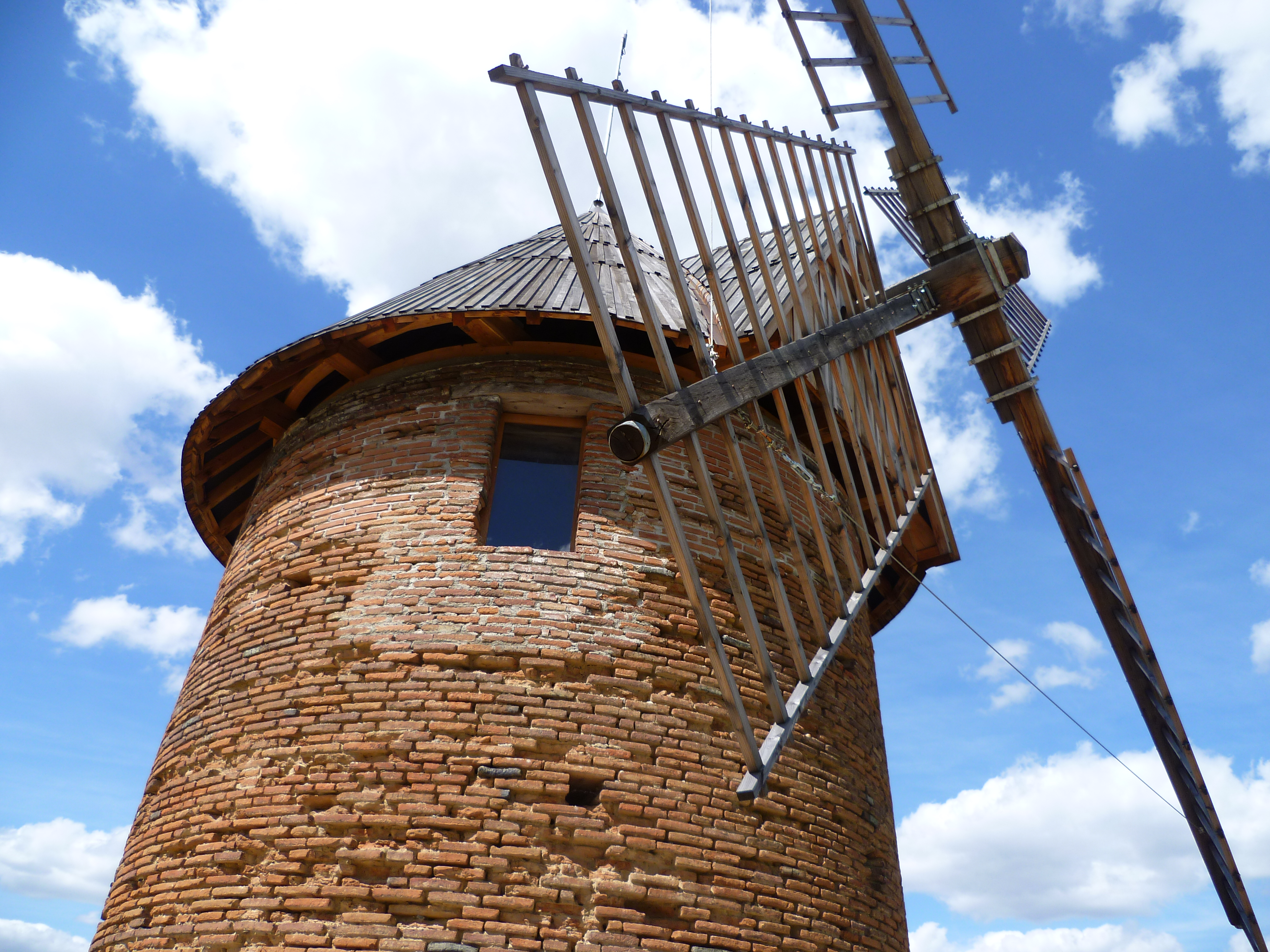 Moulin à vent de Saint-Martin-du-Touch à Toulouse (Haute-Garonne, France).